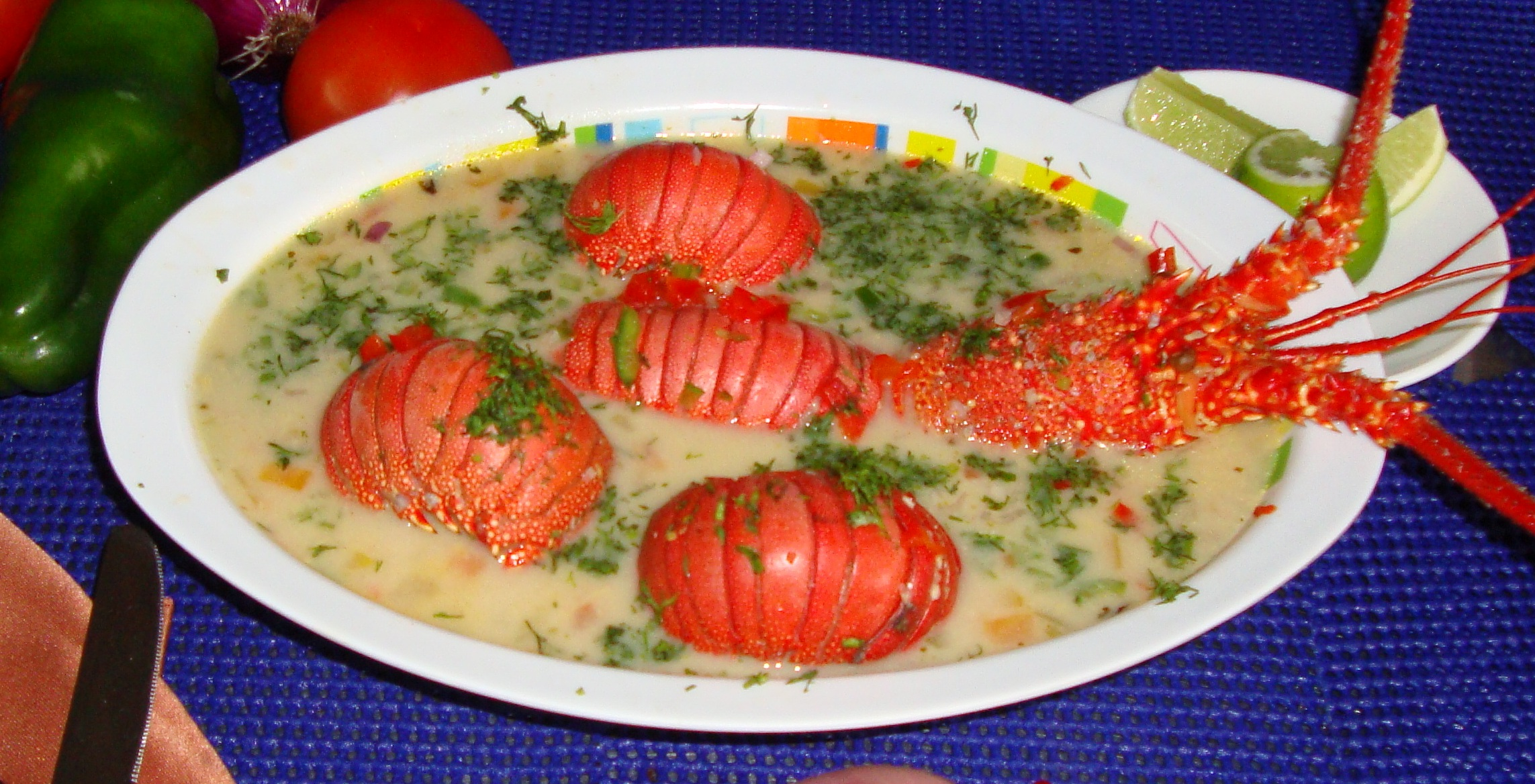 Langota de Galápagos, un plato tradicional en pescadores de las bellas islas de Galápagos